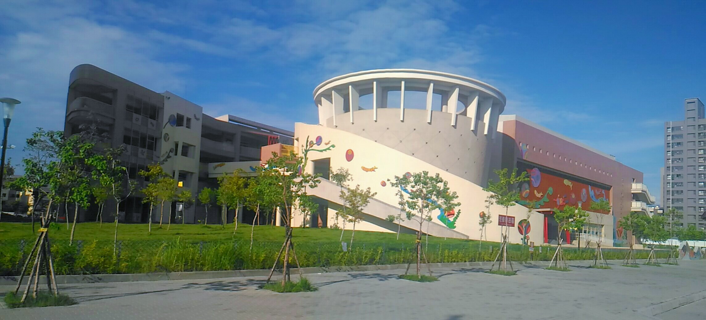 中文（台灣）: 臺中市太平區新光國民小學。